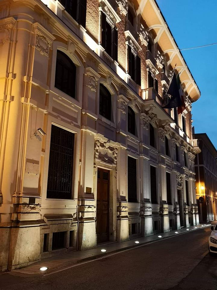 Edificio liberty dei primi del Novecento, presso cui aveva sede la Banca d’Italia.